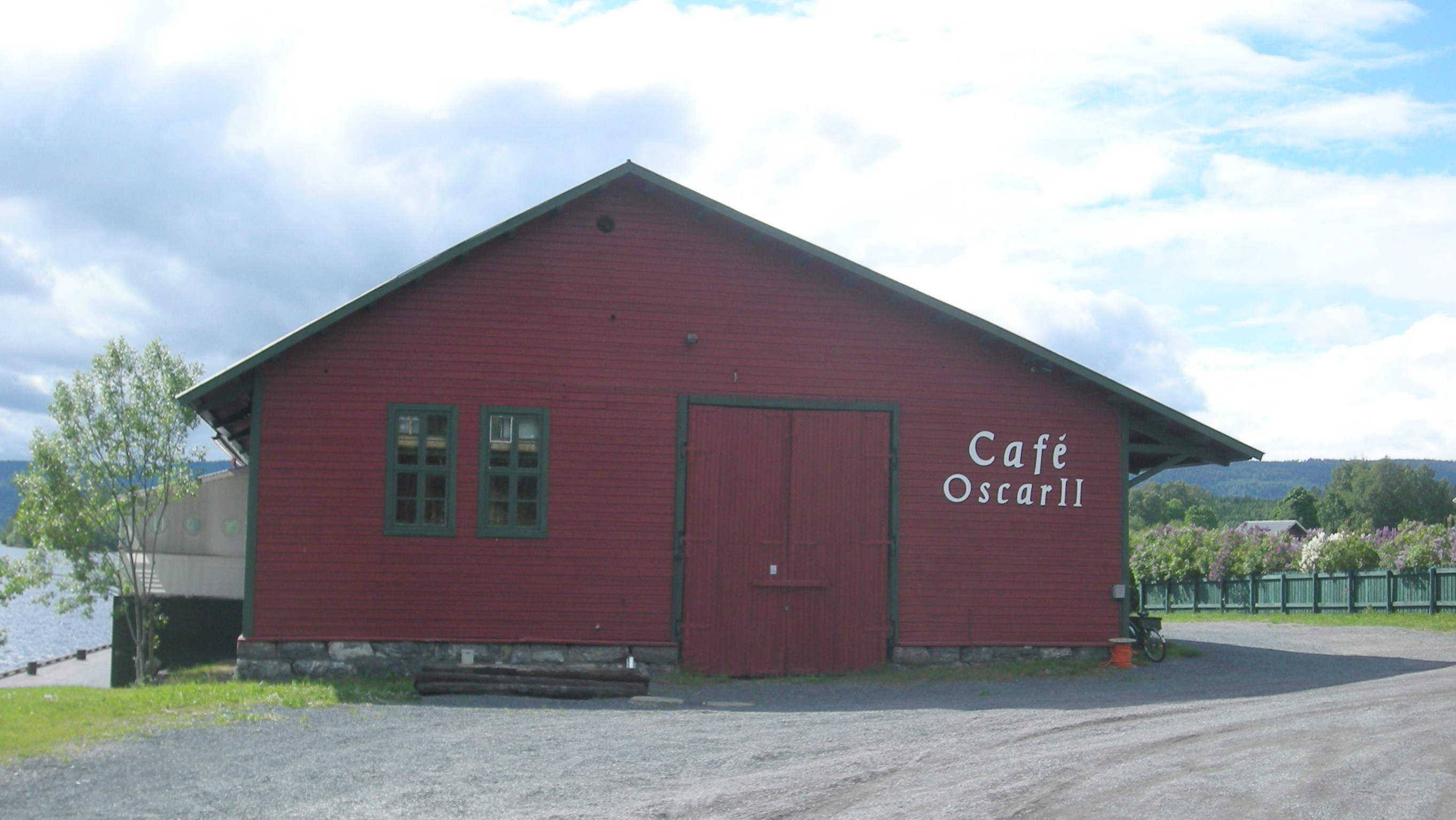 Tidligere godshus (pakkbu) ved Røykenvik stasjon. I dag kafé for den lokale båtforeningen.